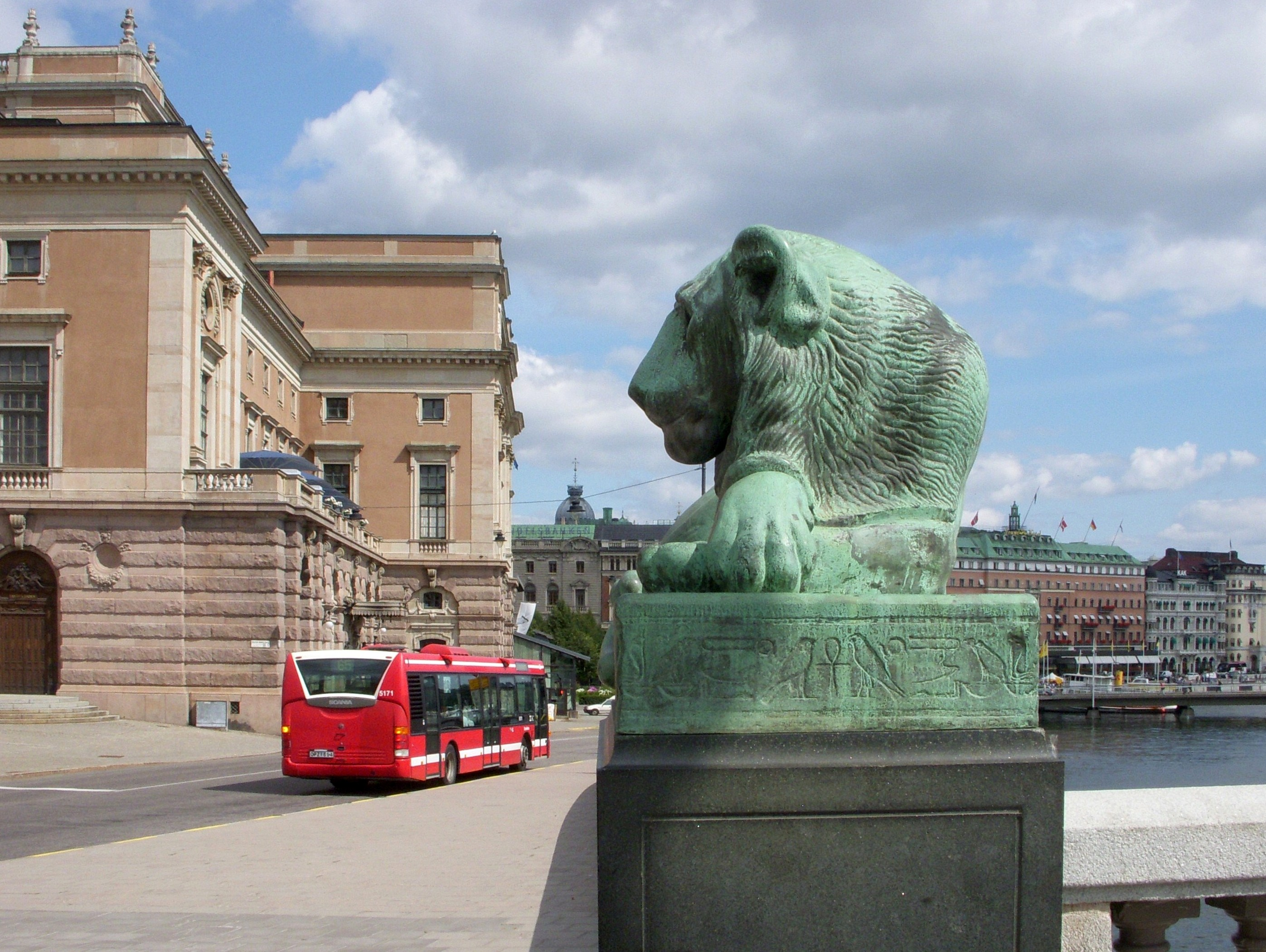 Norrbo, Stockholm, lejonskulptur, östra lejonet, Operan i bakgrunden